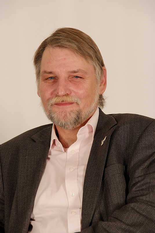 Axel Brammer, Landtagsabgeordneter Niedersachsen, 16. Wahlperiode (Fotoprojekt Landtagsabgeordnete Niedersachsen am 24. und 25. November 2009)